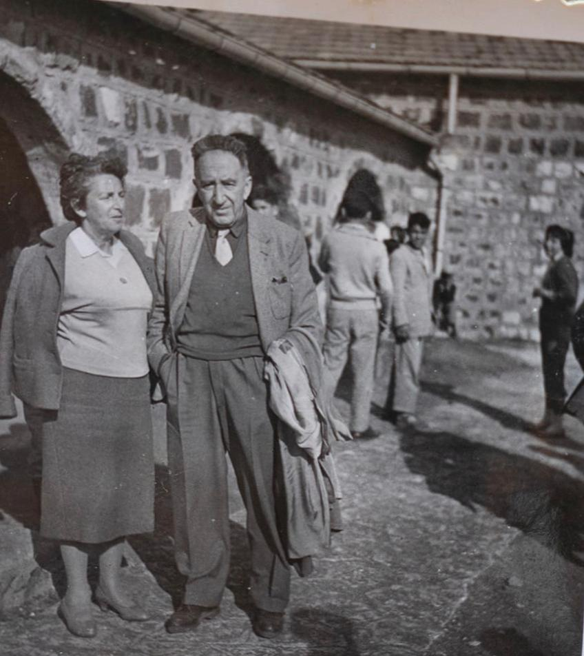 זלמן ופולה בלחובסקי בחצר תל-חי